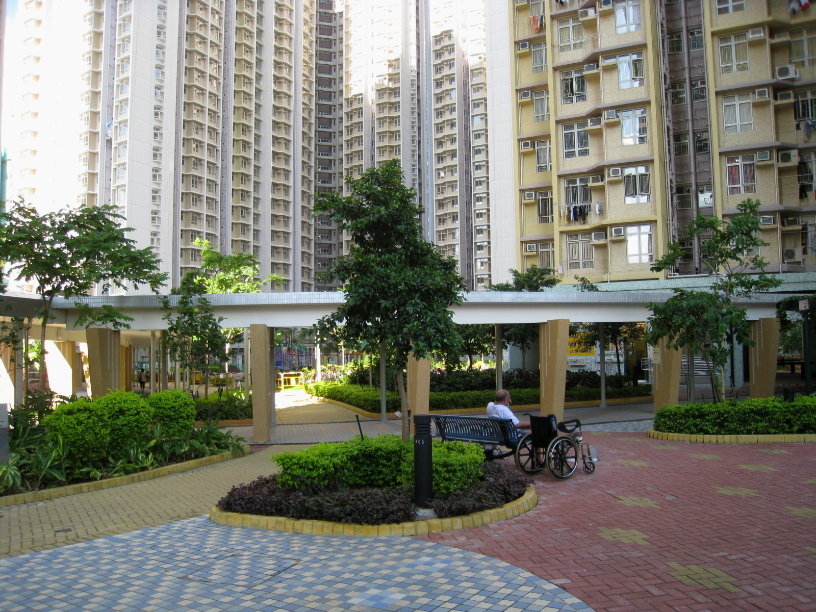 Ching Ho Estate Garden 清河邨